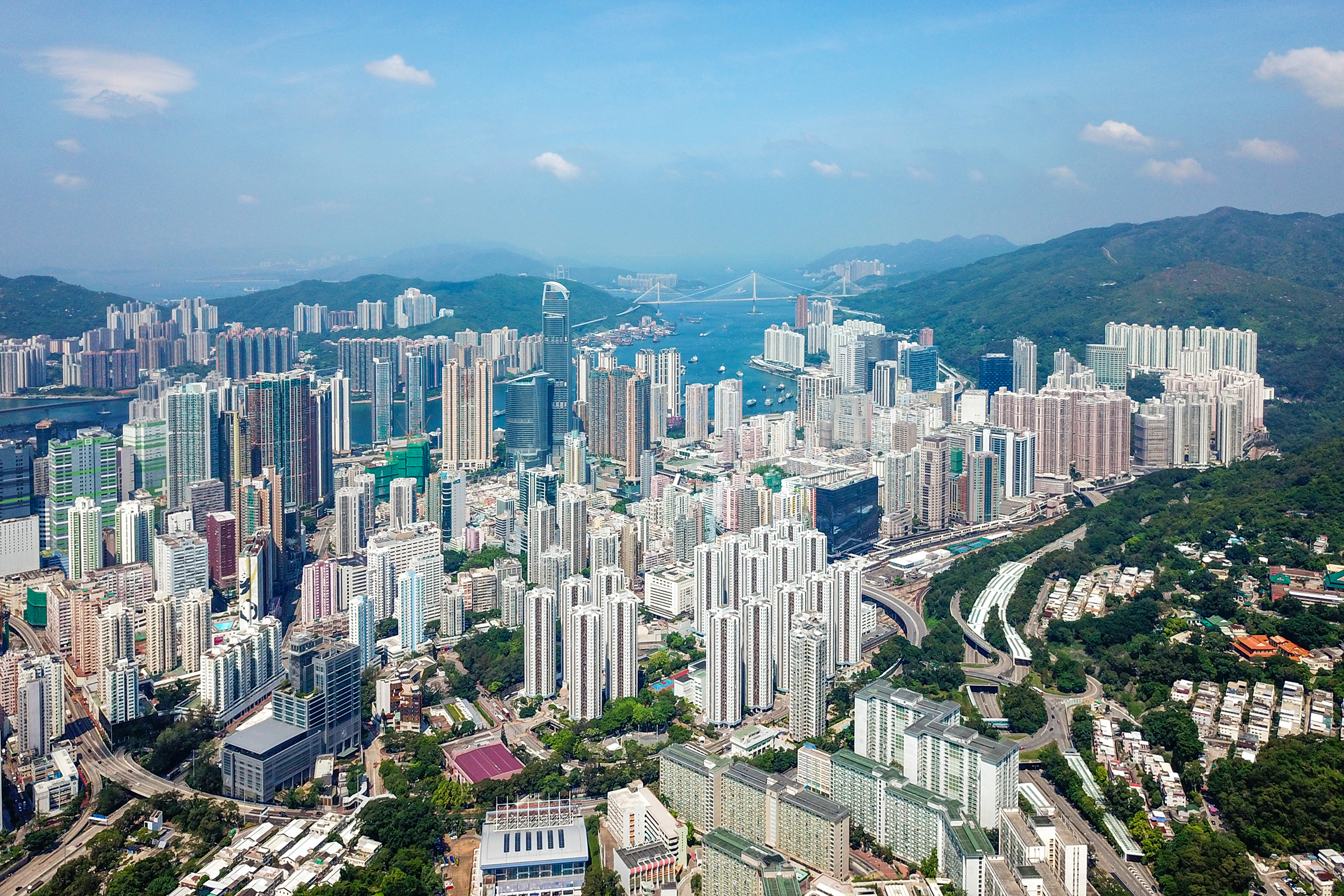 Tsuen Wan